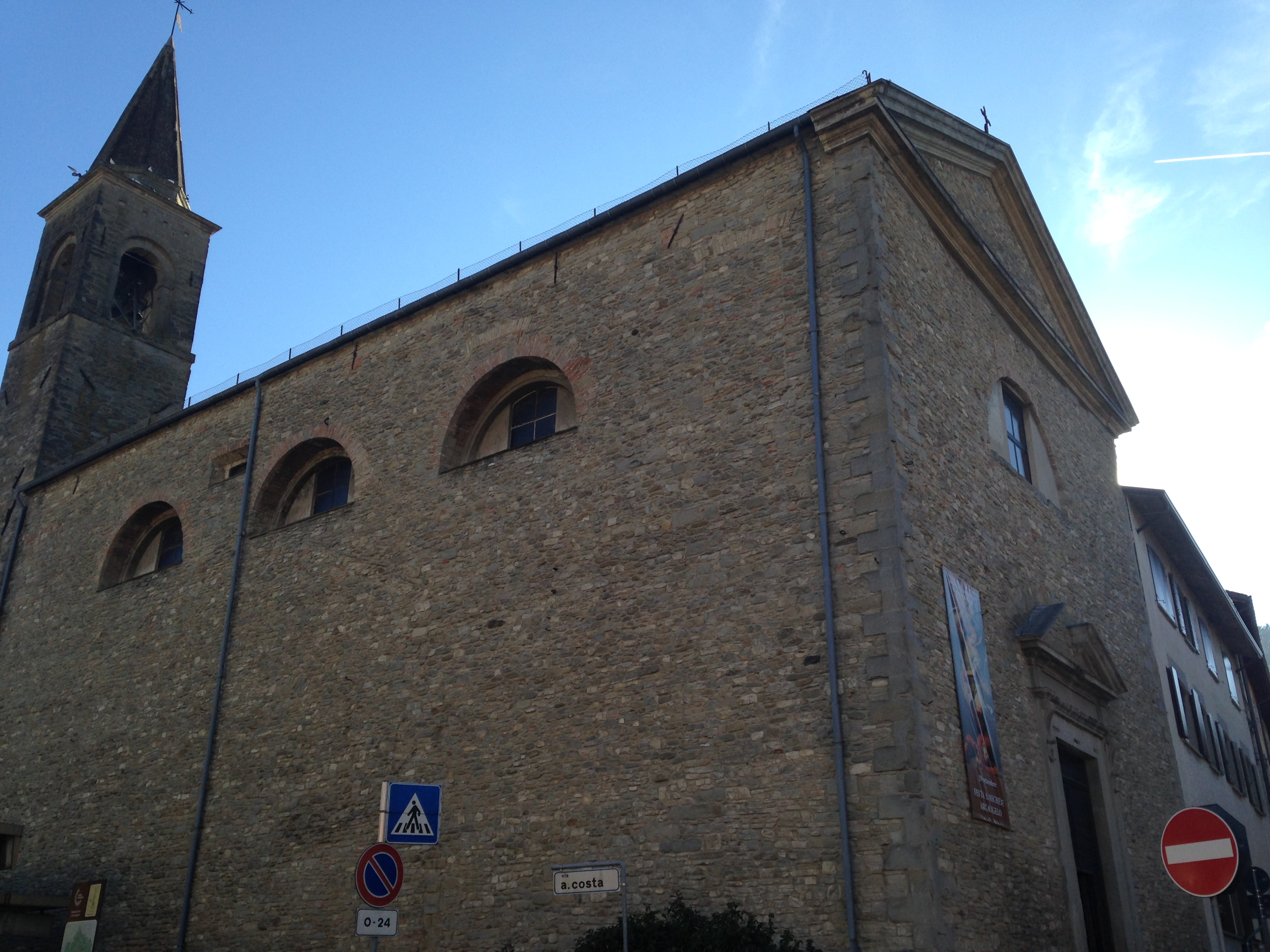 La Chiesa di Santa Maria in Borgo di Civitella di Romagna